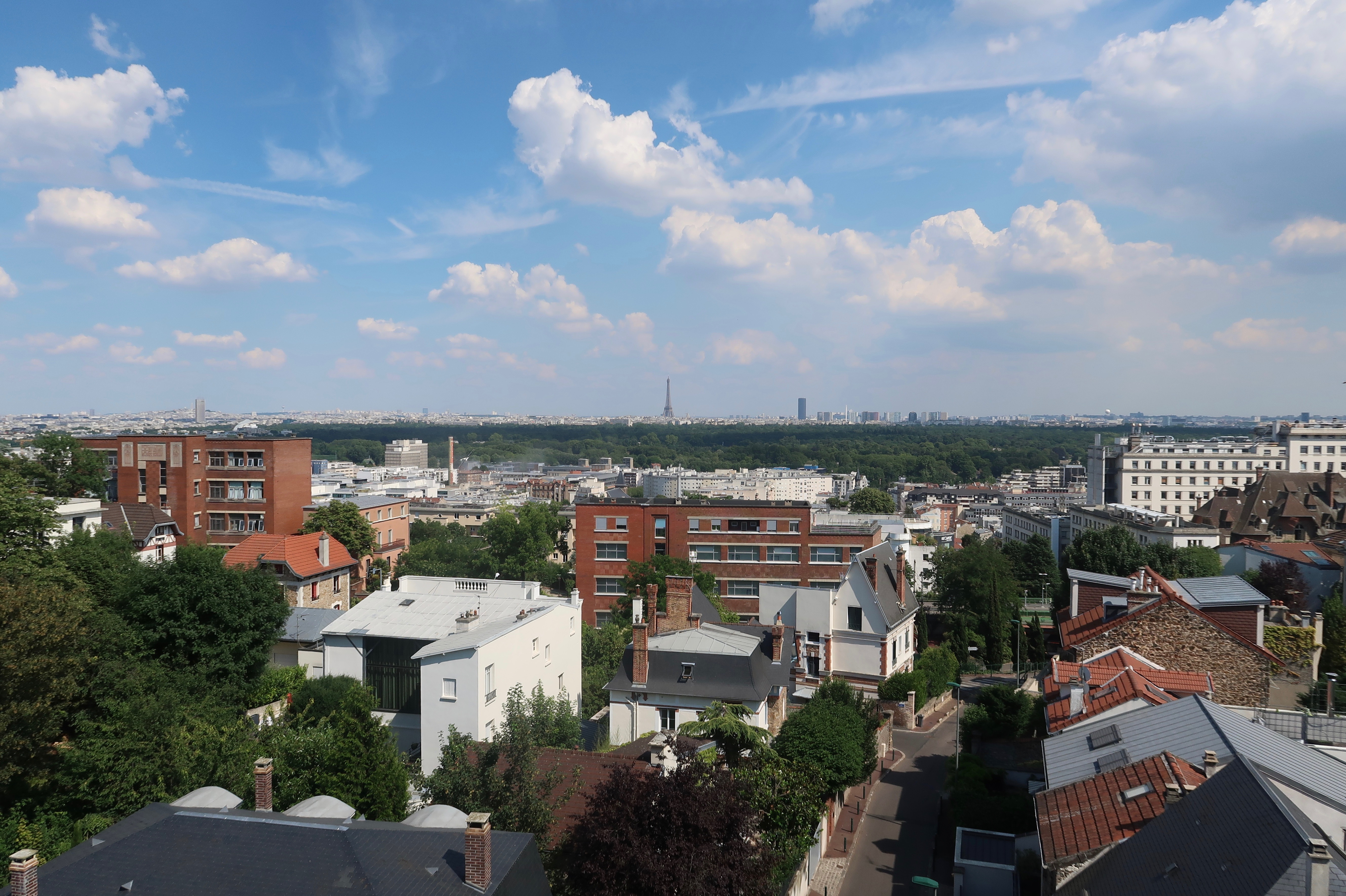 Paris vu de Suresnes (Hauts-de-Seine), depuis la terrasse du Fécheray.